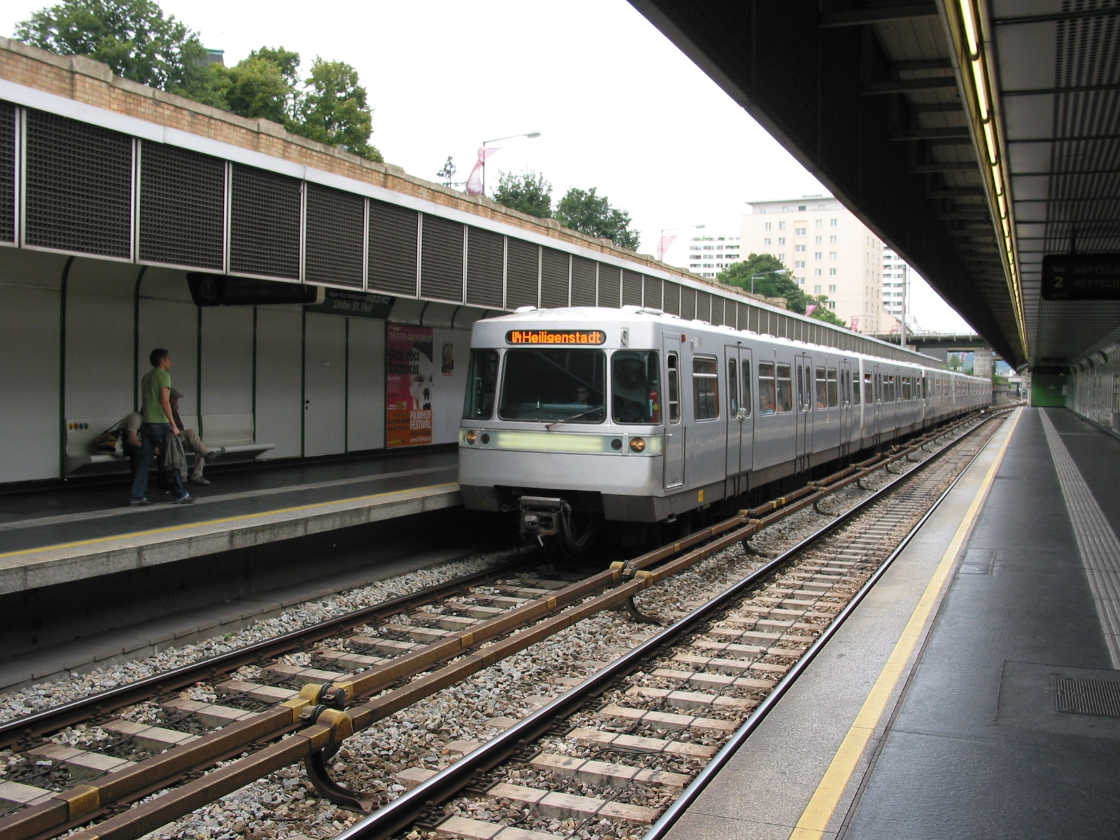 U-Bahn Station Umter St. Veit in Wien, Bahnsteigbereich